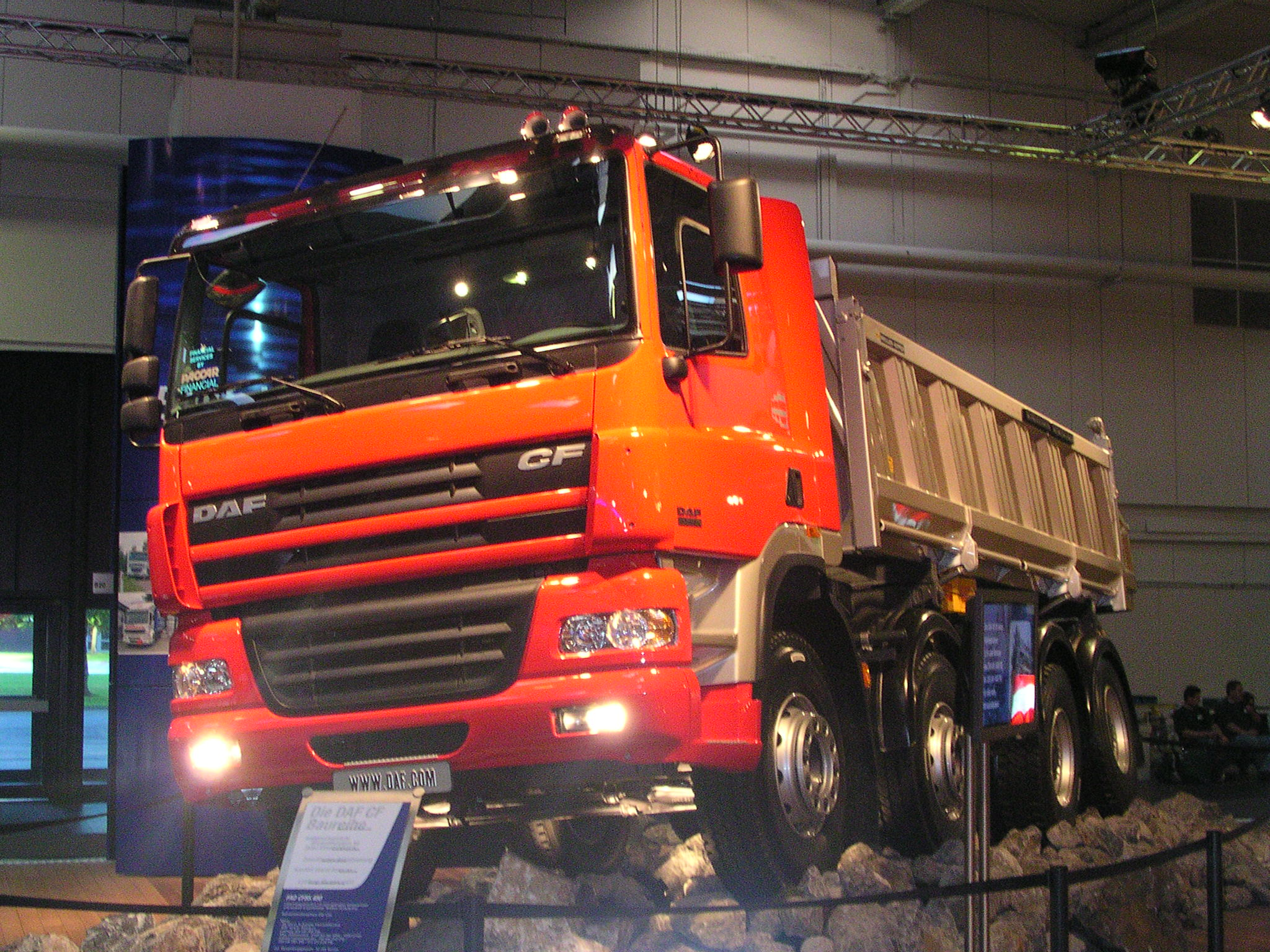 vierachsiger DAF CF Kipper bei der Internationalen Automobilausstellung in Hannover